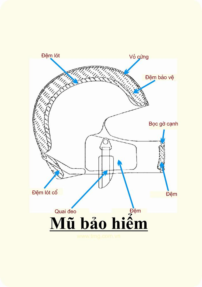 Helmet standard